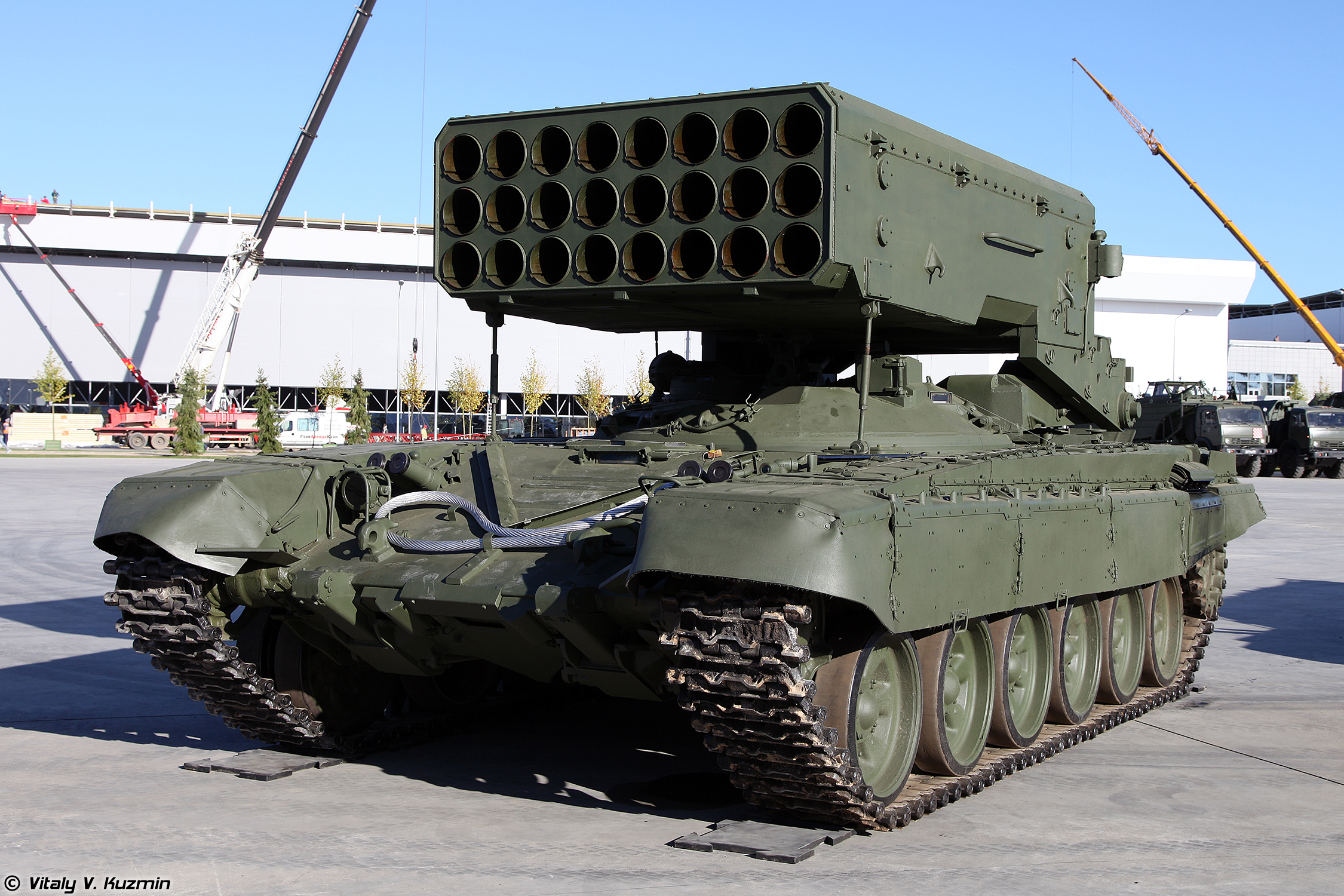 Боевая машина БМ-1 тяжелой огнеметной системы ТОС-1А Солнцепек (BM-1 combat vehicle of TOS-1A heavy flamethrower system)